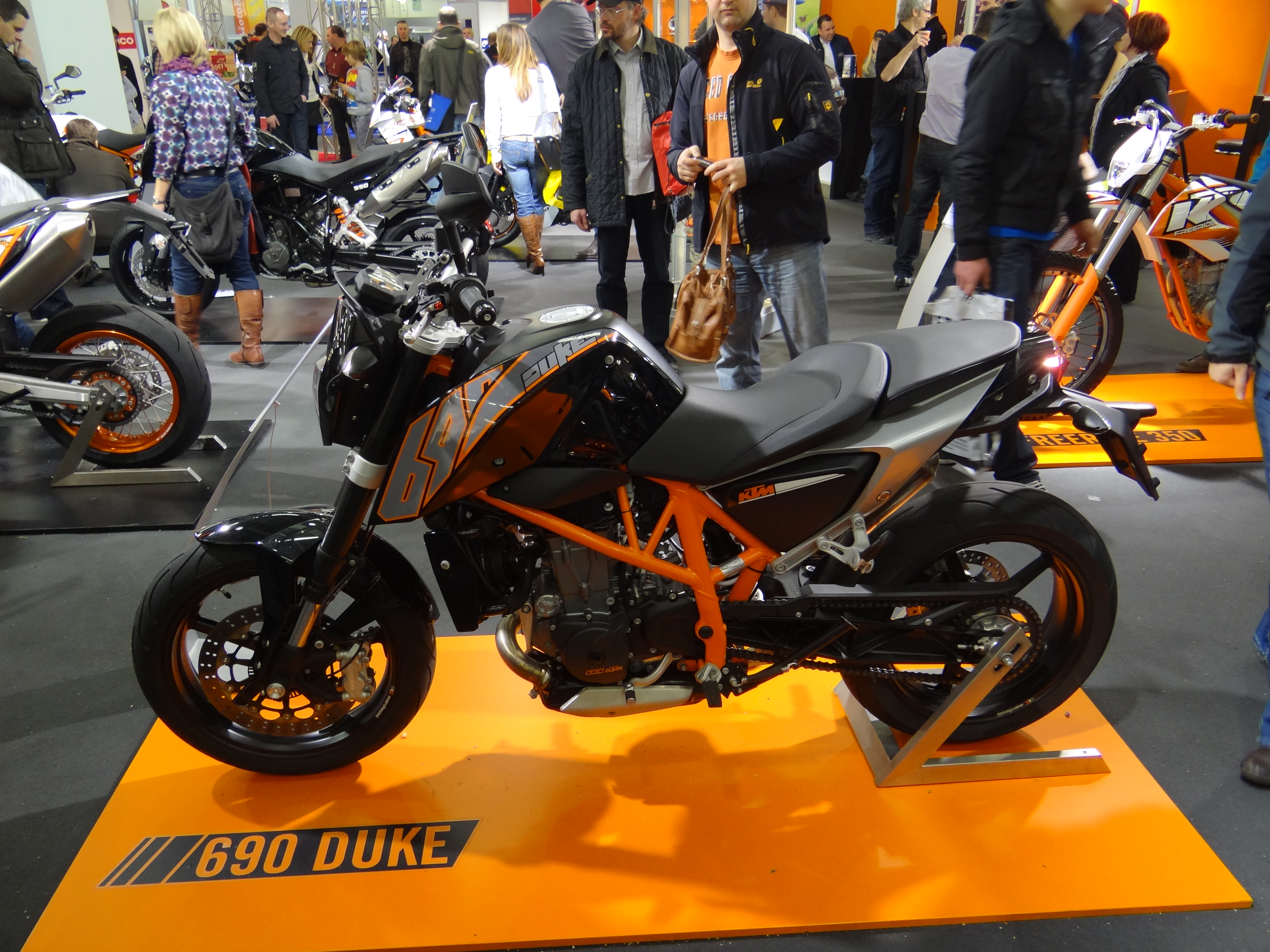 Die neue KTM 690 Duke 2012. Aufgenommen auf der IMOT 2012 in München.